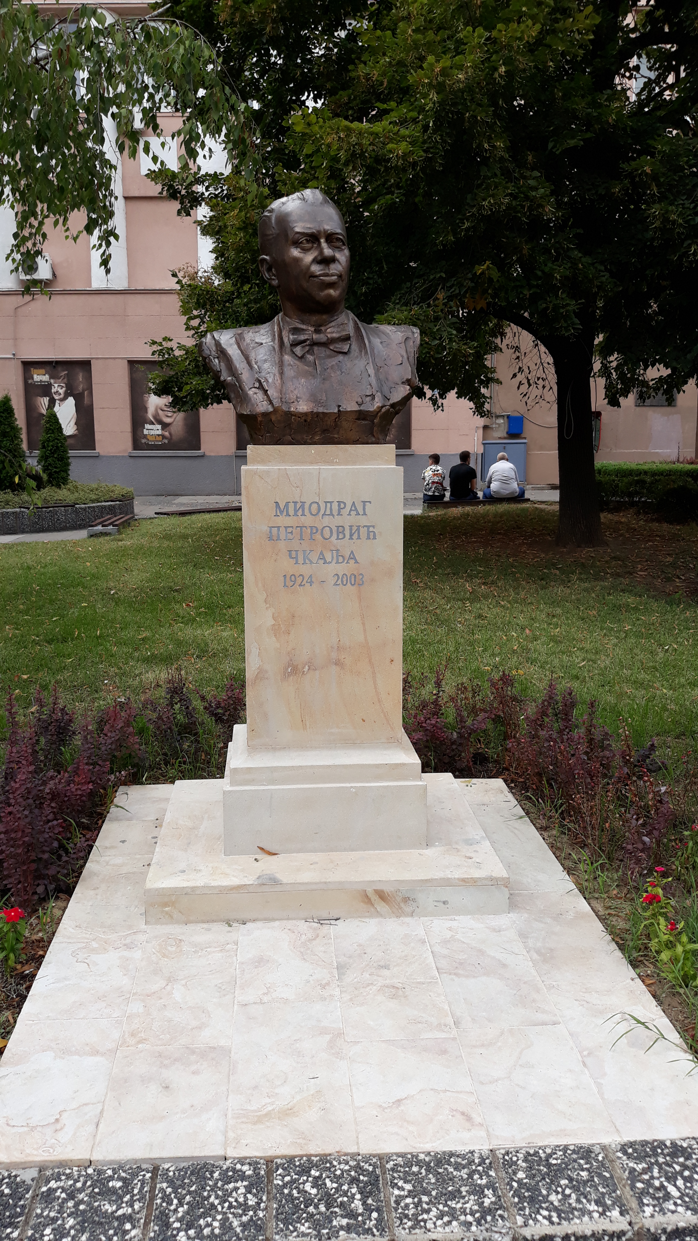 Биста Миодрагу Петровићу Чкаљи испред зграде Културног центра у Крушевцу